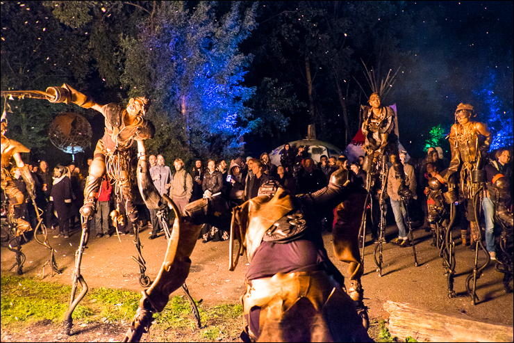 Een van de kunstzinnige activiteiten op het jaarlijkse ADM festival.